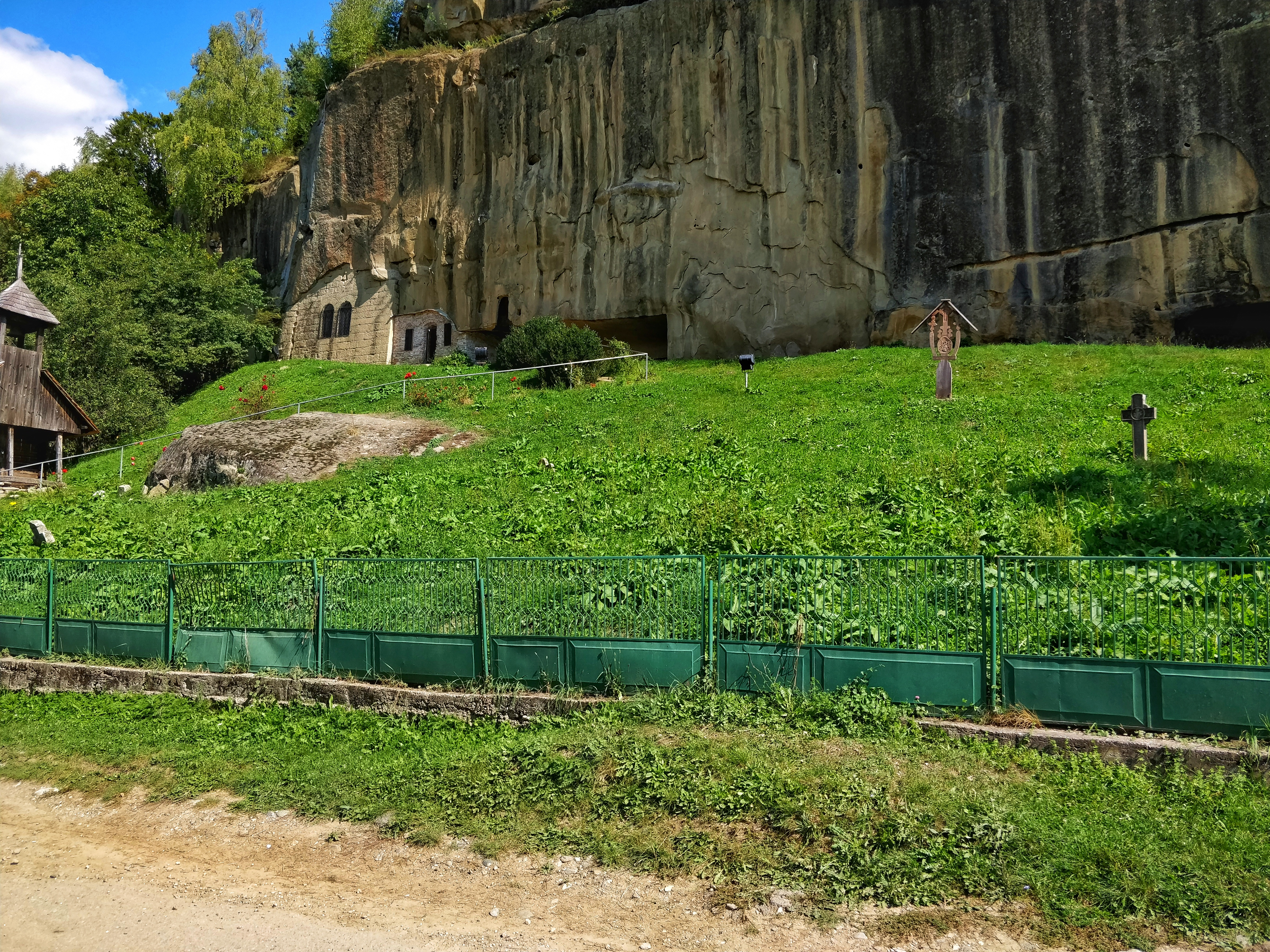 Cimitir 04